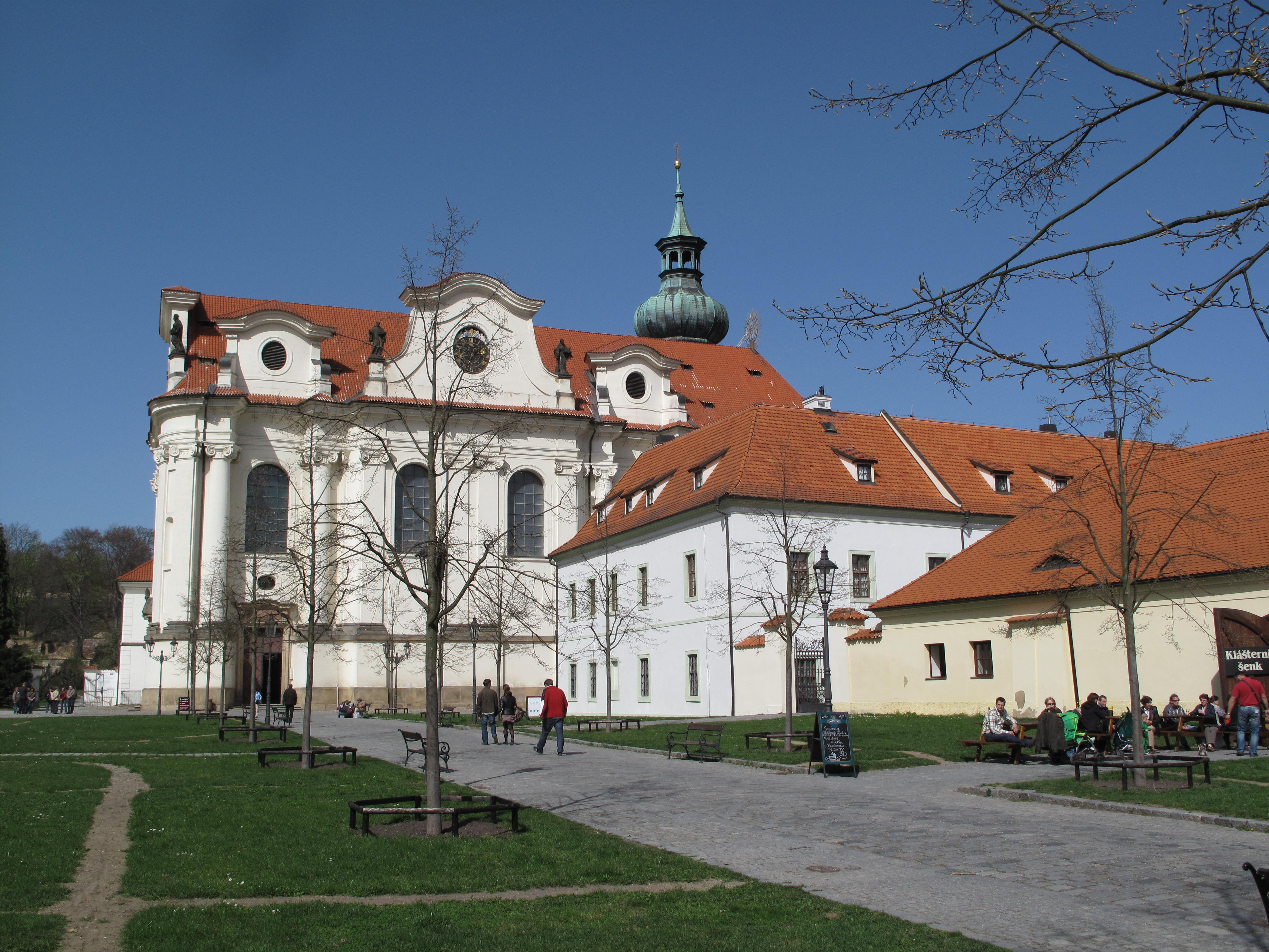 Břevnovský klášter